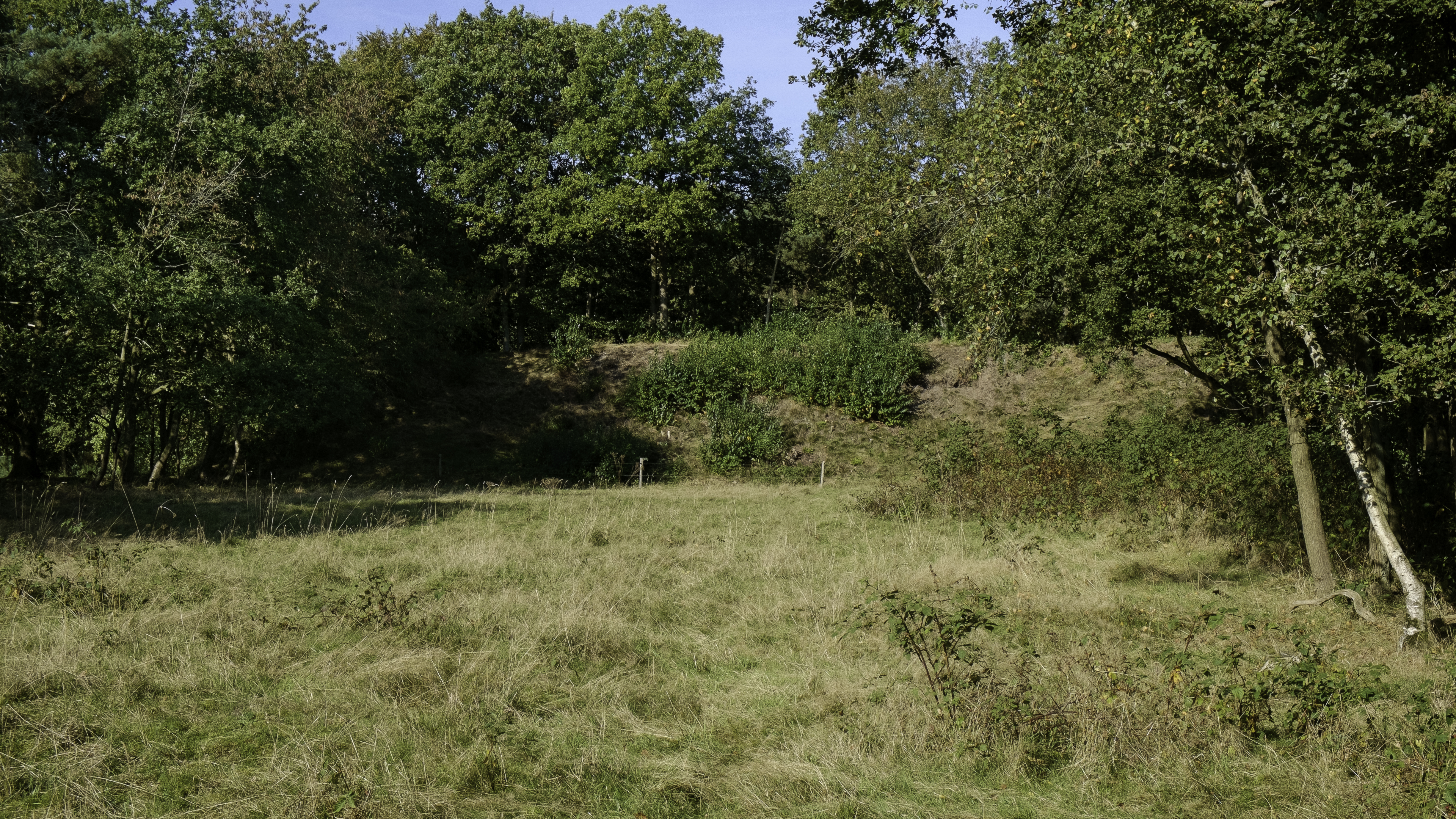 Kogelvanger ten zuiden van het Noordlaarderbos